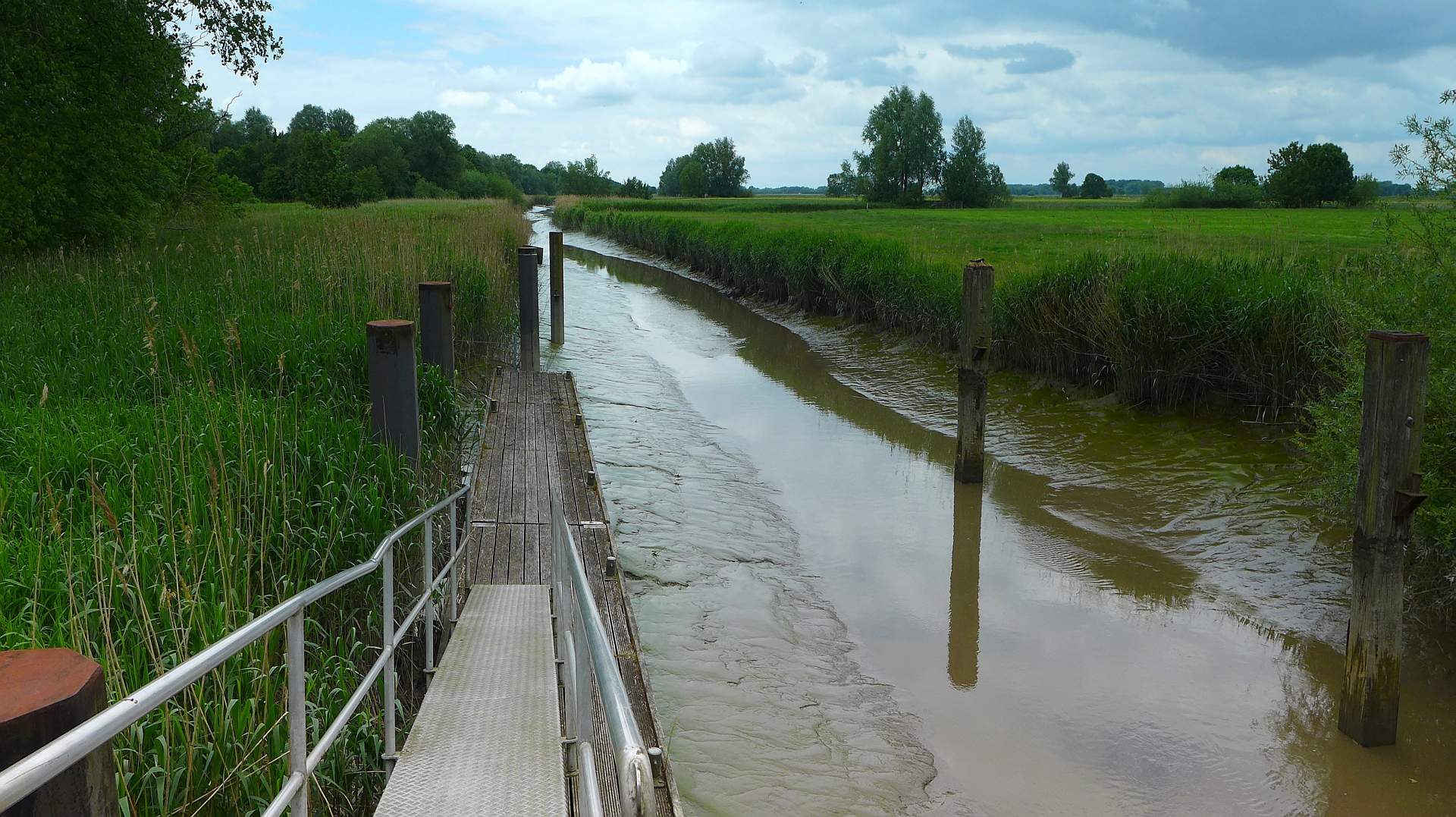 Schiffsanleger, Wischhafener Süderelbe bei Niedrigwasser nahe der Ortschaft Dornbusch. Blickrichtung westwärts, Aufnahmedatum 2015-06.